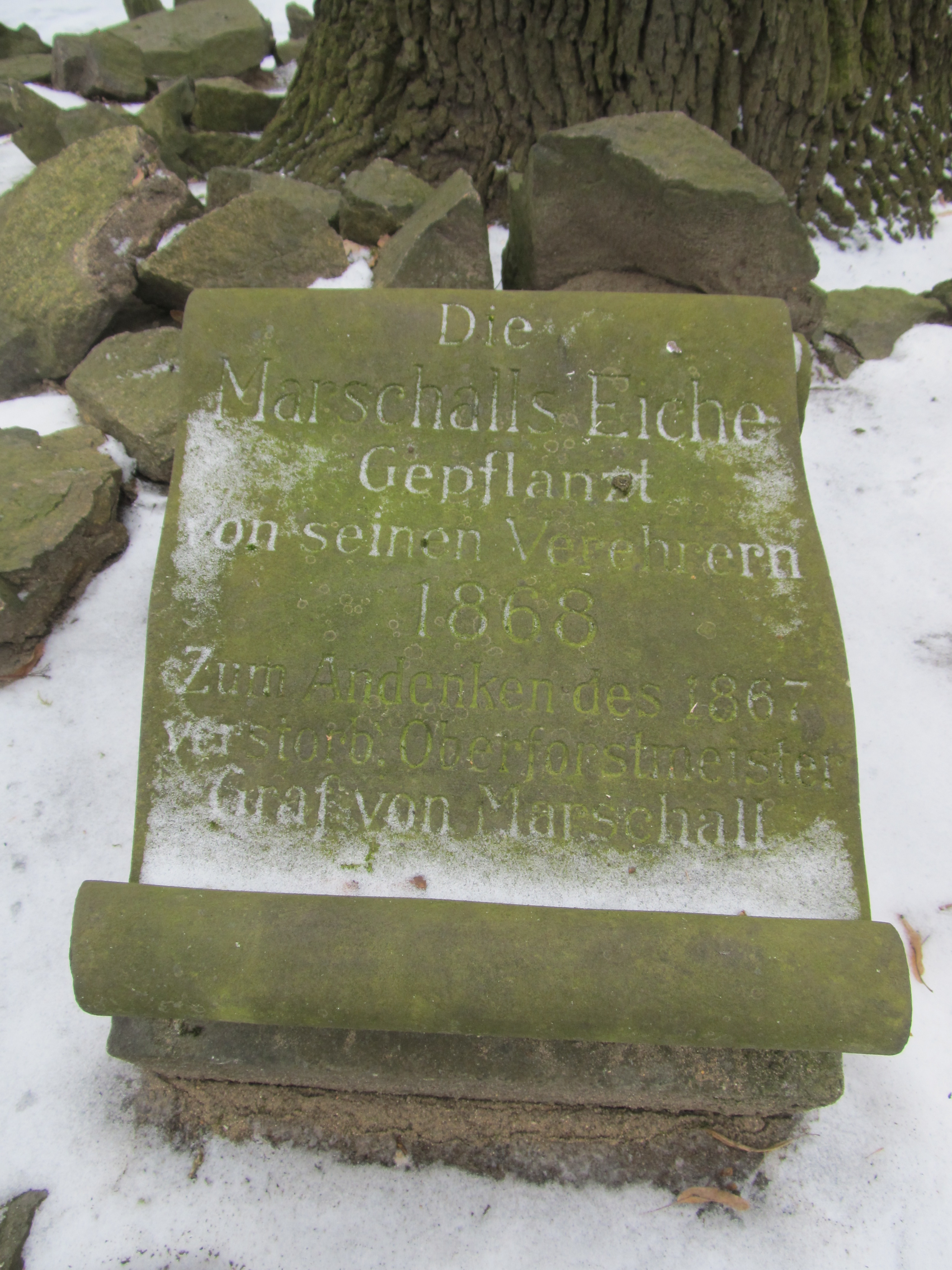 Gedenkstein Marschalleiche auf dem St.-Pauli-Friedhof in Dresden